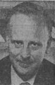 Arkitekten Leif Haking